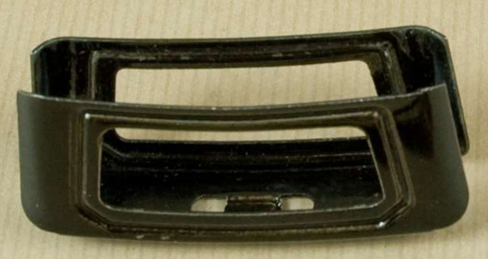 Okvirček za nizozemsko puško Mannlicher M1895.